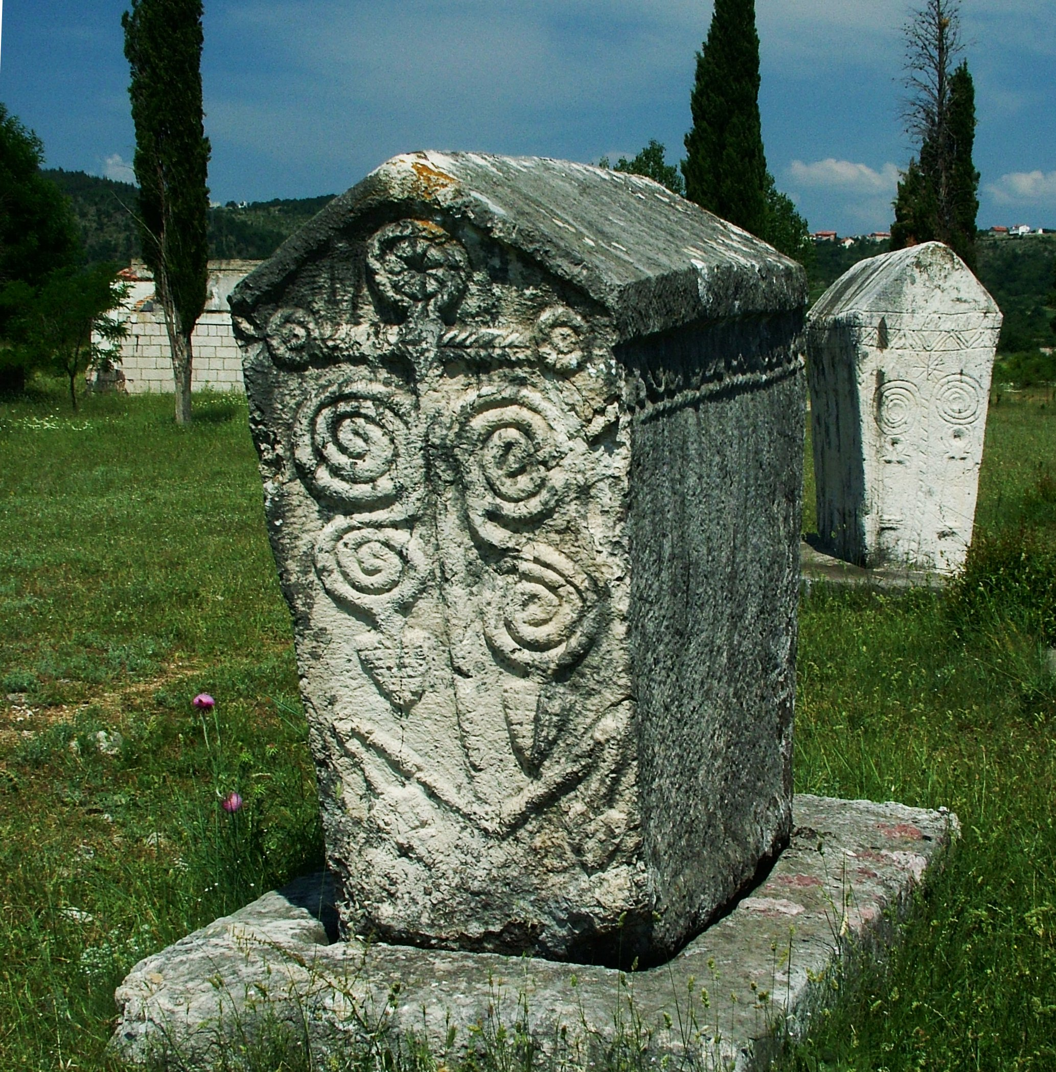 Radimlje, bogumil nekropolisz (Bosznia)